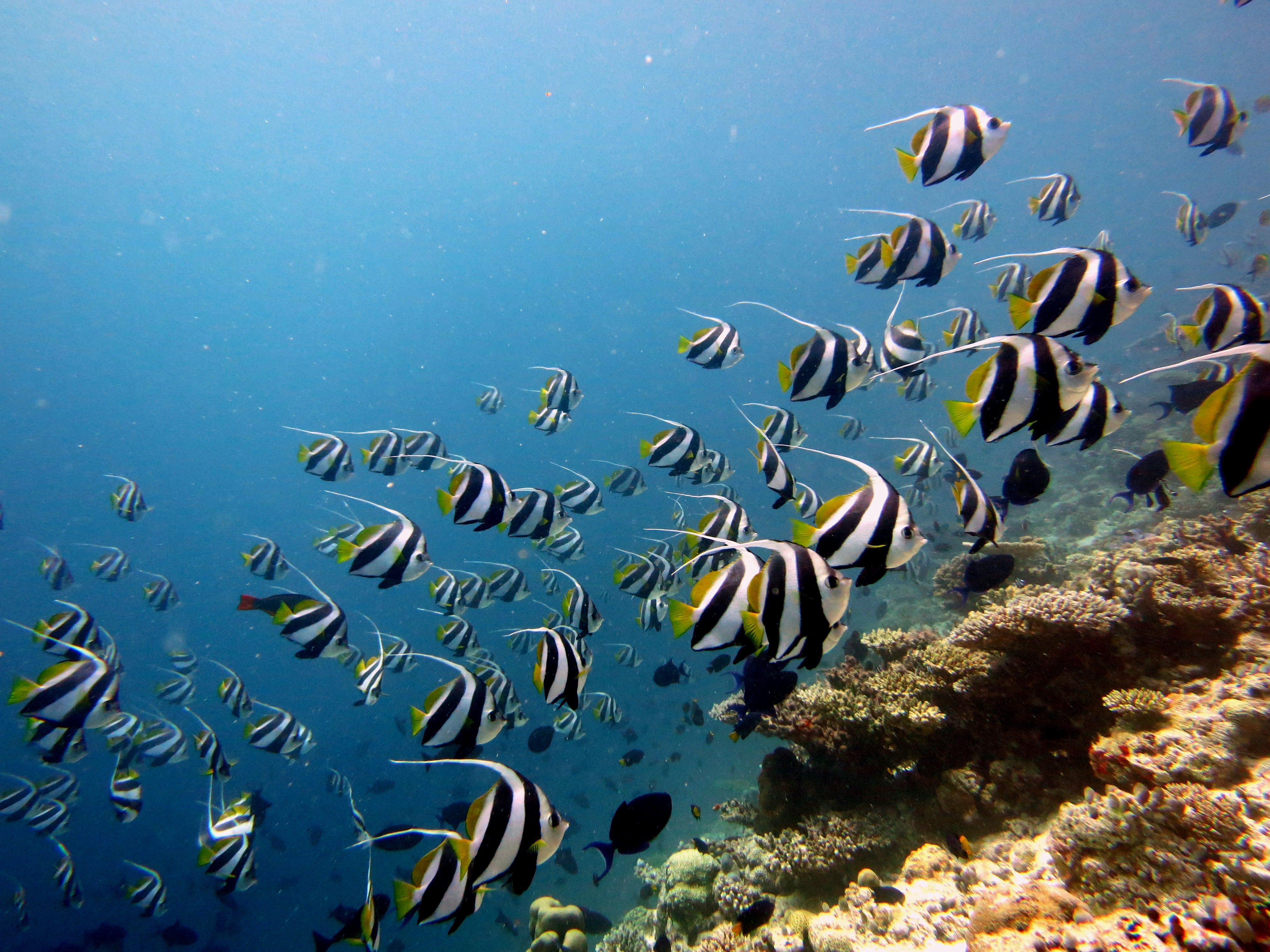 un banc de poissons-cochers (Heniochus diphreutes) aux Maldives (atoll de Baa).